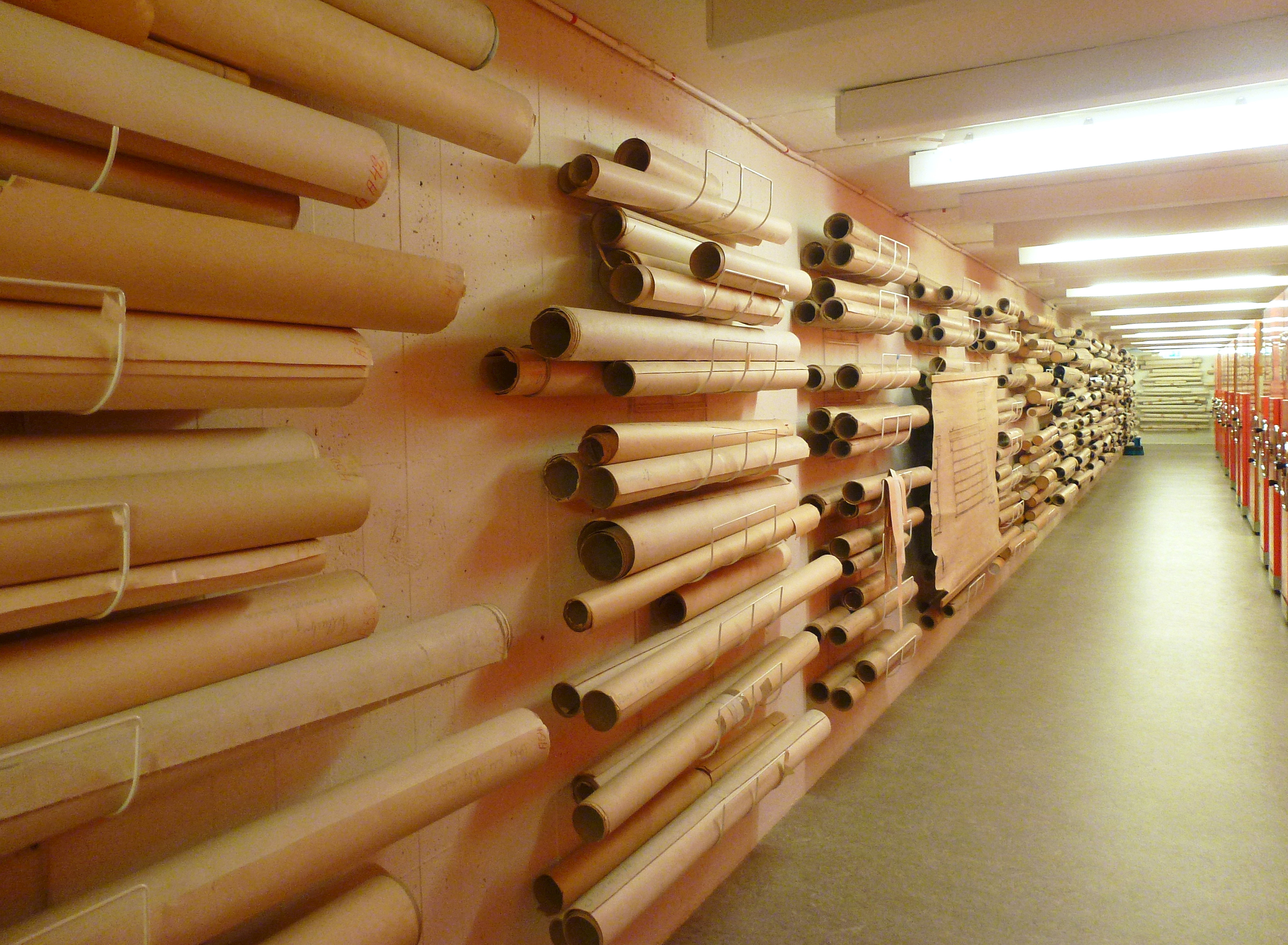 Stockholms stadsarkiv ritningsarkiv